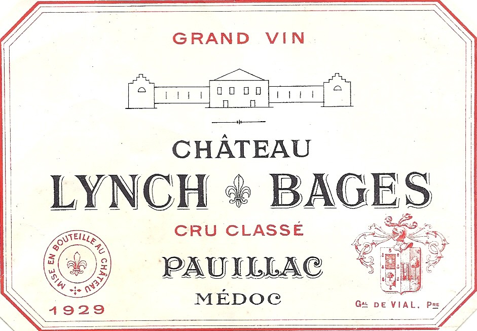 etiquette des bouteilles de Lynch Bages début du XX° siècle